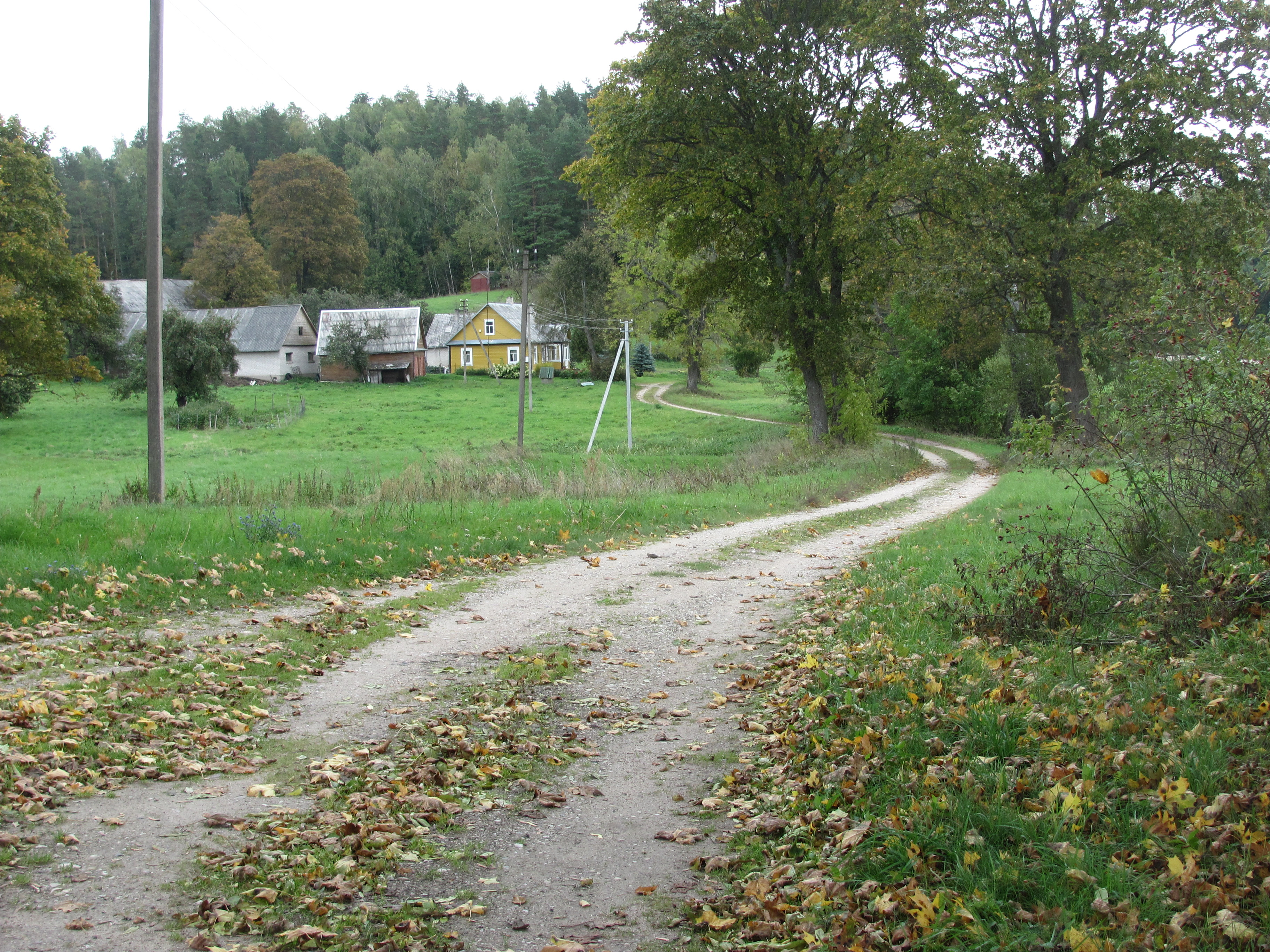 Tauragnų sen., Lithuania